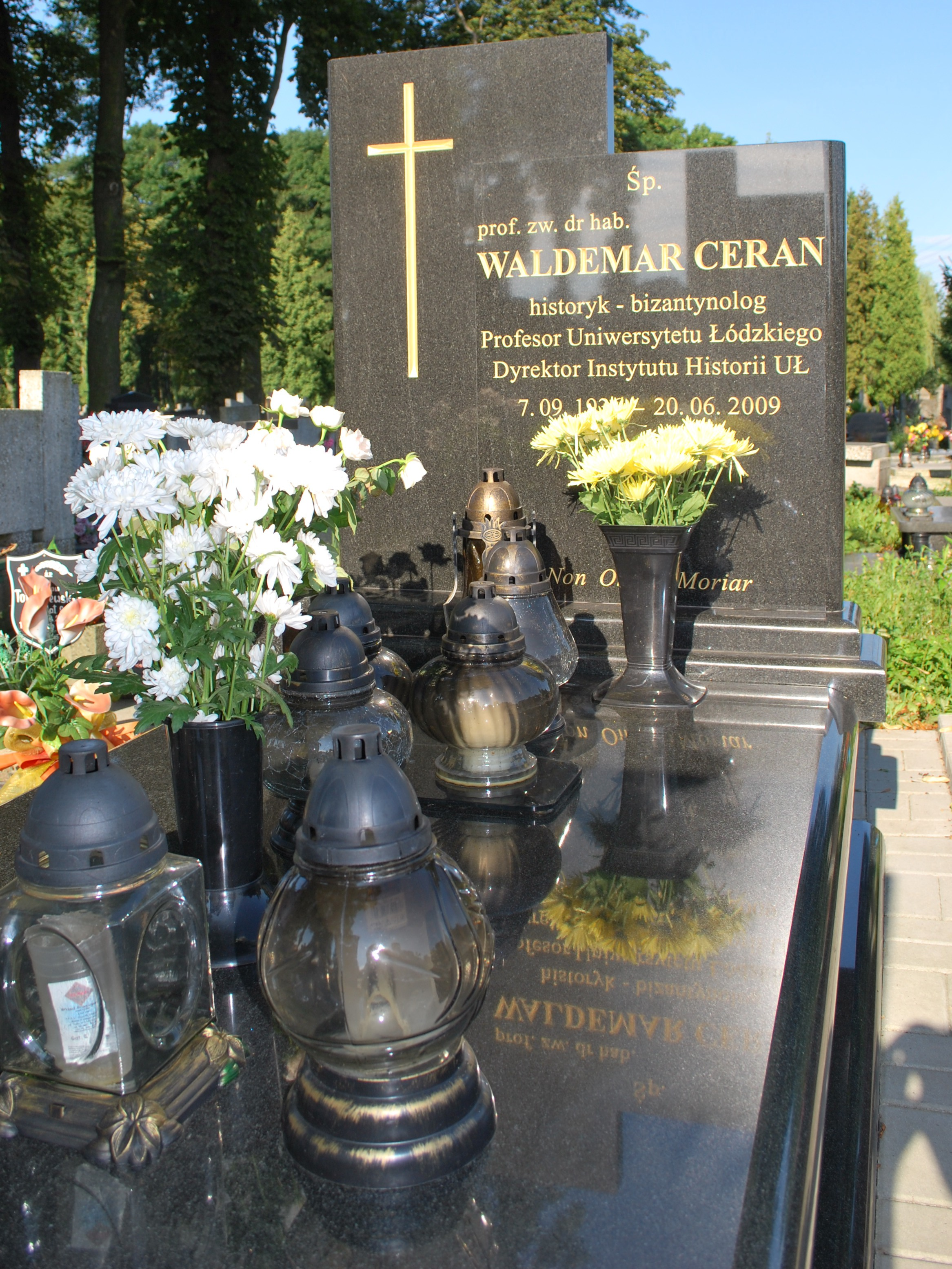 Nagrobek Waldemara Cerana